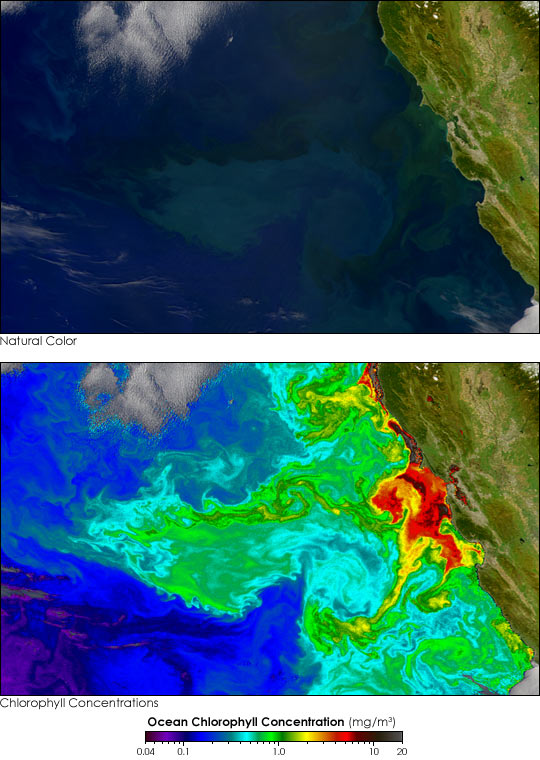 Vor der Kalifornischen Küste wird nährstoffreiches Tiefenwasser durch Meeresströmungen an die Meeresoberfläche gedrückt. Dieses nährstoffreiche Wasser sorgt für eine große Vermehrung des Phytoplanktons. Das untere Falschfarben Satellitenbild zeigt den Chlorophyll-Gehalt des oberflächennahen Meerwassers. Die höchsten Konzentrationen von Phytoplankton (Schwarz- bis Rottöne) finden sich an den Stellen, wo das nährstoffreiche Tiefenwasser nach oben strömt.